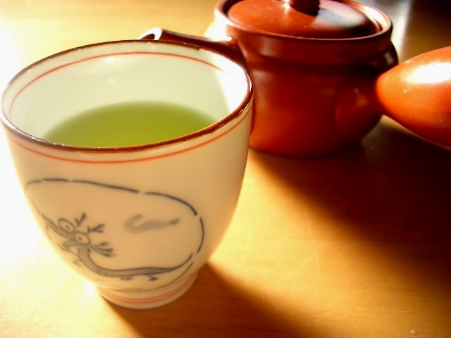 Good mornig,guys! Why don't you drink with me?